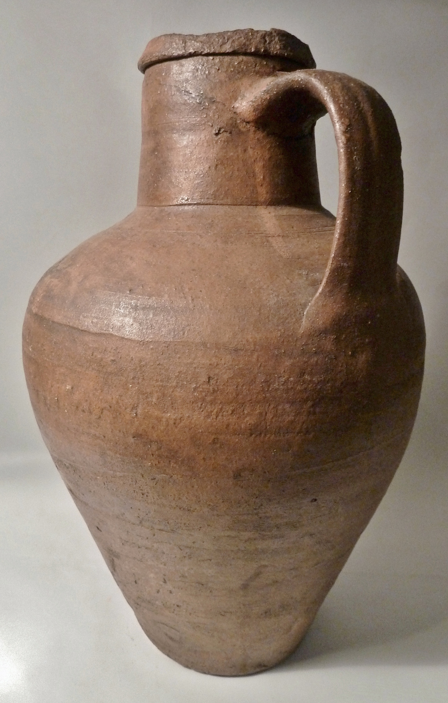 Cántaro de Coca (Segovia); altura: 39 cm.; posible obra de la familia Murciego, siguiendo modelos de los cántaros de boca ancha de Jiménez de Jamuz. Los restos de vidriado en la boca parecen hechos con resina de pino. Ver estudios recopilados por el Equipo Adobe en Los barros segovianos. Alfareros y tejeros (2017). Cita del Diccionario Geográfico y Estadístico de Pascual Madoz (Tomo VI), de 1847: “también se emplea la trementina de los pinos para adornar los barros que se vendían a la provincia de Valladolid”.